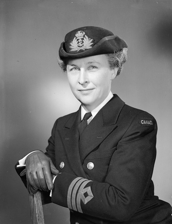 Title / Titre : Commander Adelaide Sinclair, Director of the Women's Royal Canadian Naval Service. / Le capitaine de frégate Adelaide Sinclair, directrice du Service féminin de la Marine royale du Canada. Creator(s) / Créateur(s) : Gerald Milne Moses Date(s) : July, 1944 / juillet 1944 Reference No. / Numéro de référence : MIKAN 3526940 Location / Lieu : Ottawa, Ontario, Canada Credit / Mention de source : Lt Gerald M. Moses. Canada. Department of National Defence. Library and Archives Canada, PA-191176 / Lt Gerald M. Moses. Canada. Ministère de la défense nationale. Bibliothèque et Archives Canada, PA-191176